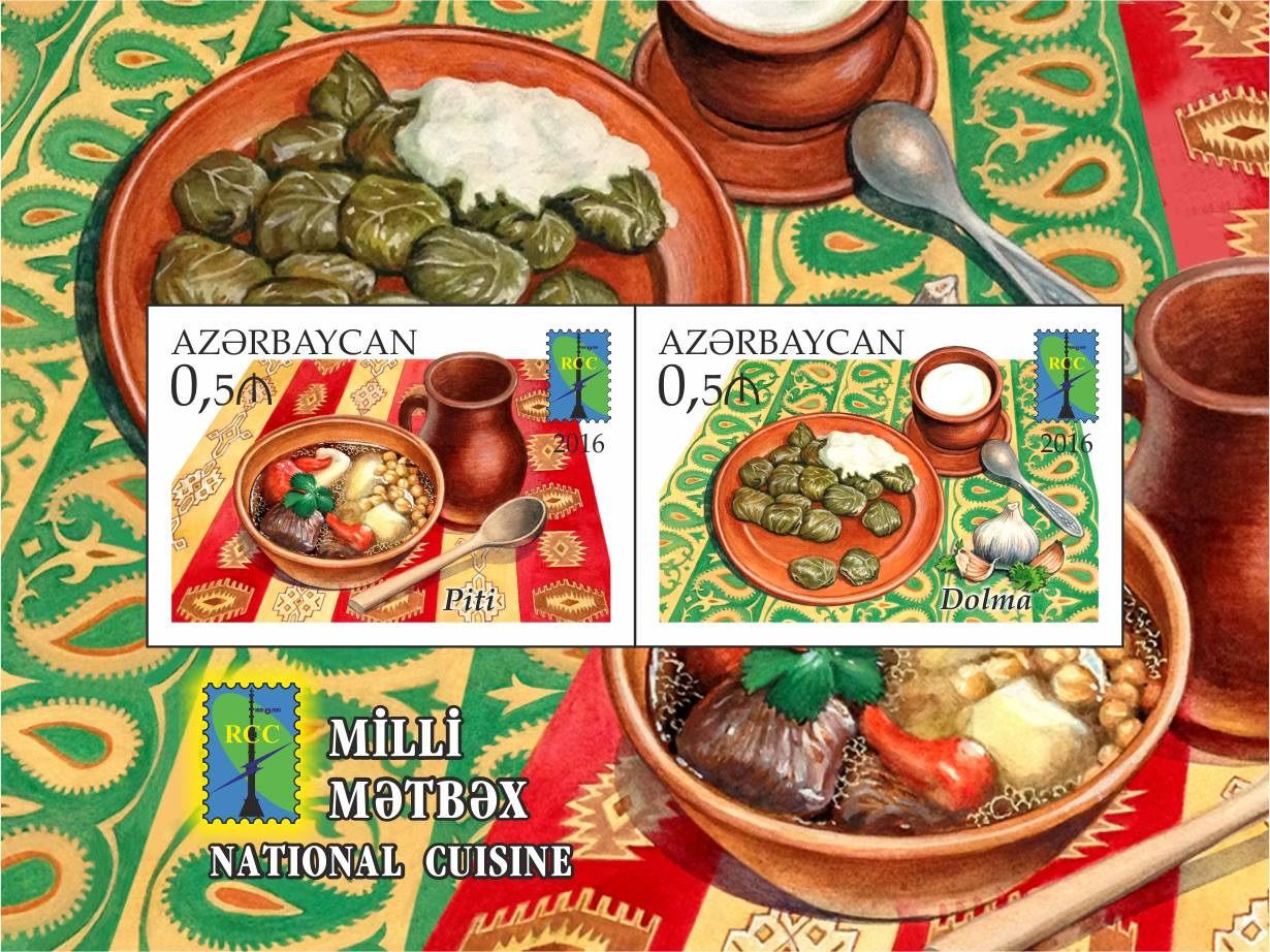 National cuisine. N 1284 - 50 qapik – There are pictured the national dishes “Piti” on the stamps. N 1285 - 50 qapik – There are pictured the national dishes “Dolma” on the stamps. The souvenir sheet issued according RCC ( Regional Commonwealth in the field of Communications) program.